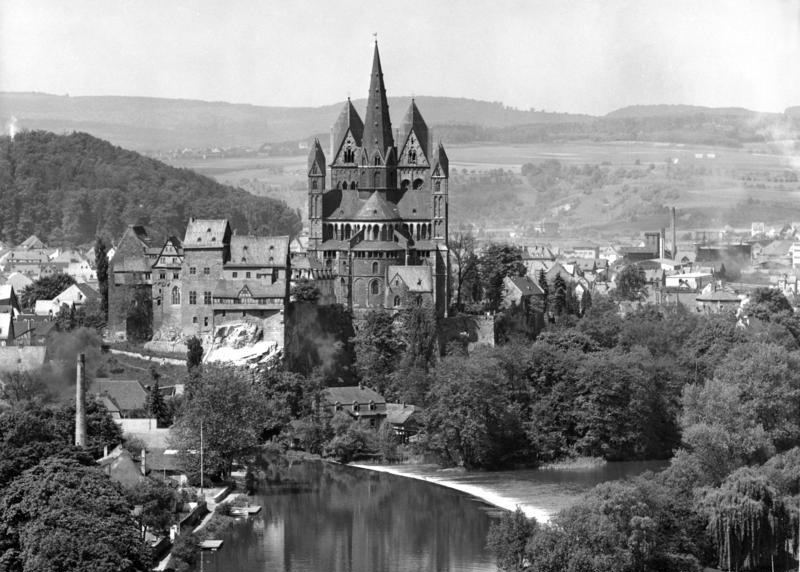 Limburg/Hessen Der Dom zu Limburg von der Autobahn aus